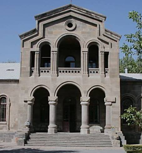 Քրիստոնեական դաստիարակության կենտրոնի գրասենյակը Մայր Աթոռ Սուրբ Էջմիածնում